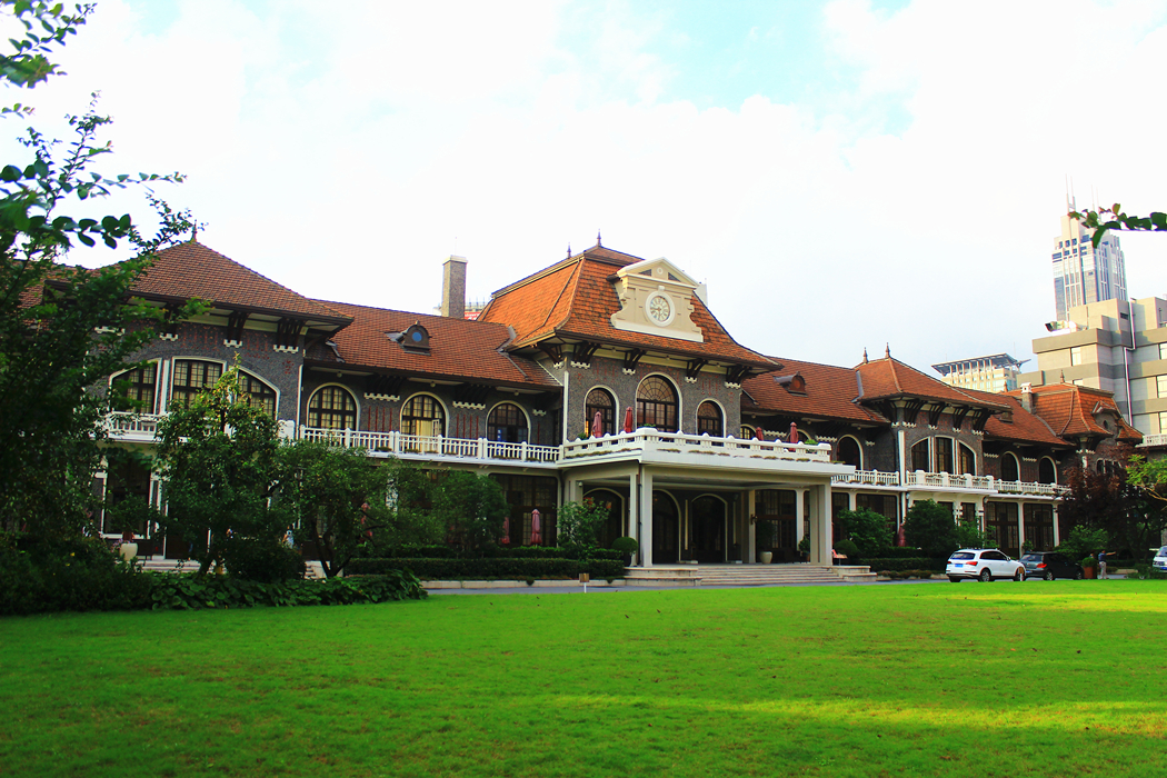 中文（中国大陆）: 南昌路科學會堂